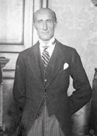 Ludovico Spada Veralli Potenziani, governatore di Roma